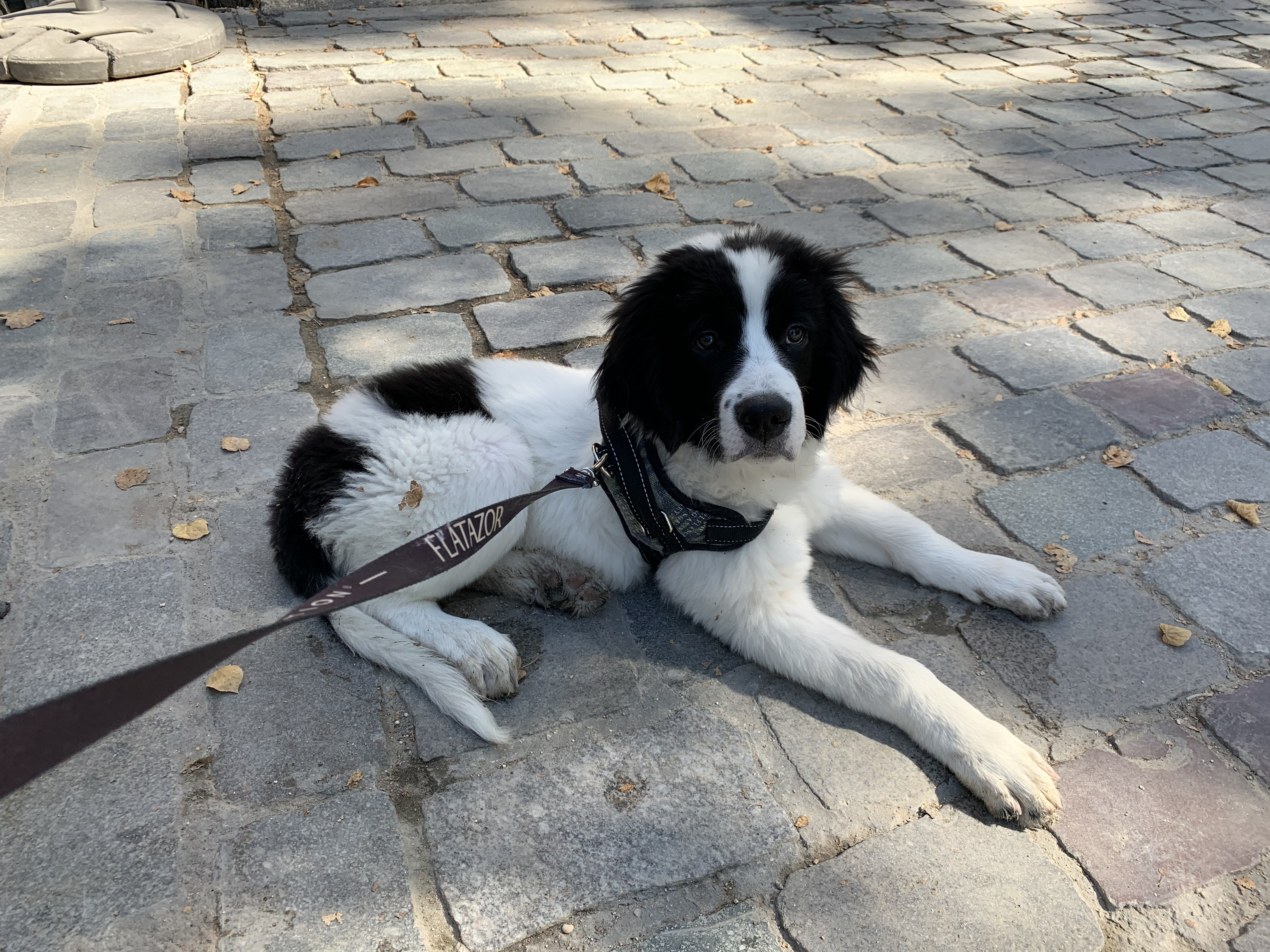 Landseer Chiot femelle de 23 kilos à 4 mois